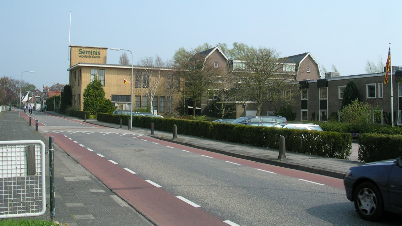 Eén van de zaadbedrijven in Westeinde, Enkhuizen. One of the seed companies in Westeinde,Enkhuizen.